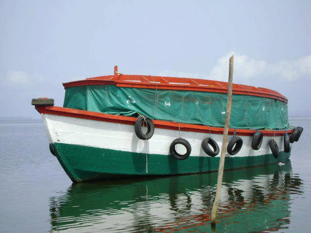 pinasse, akounougbé, adjomolo, moyen de transport, adiaké